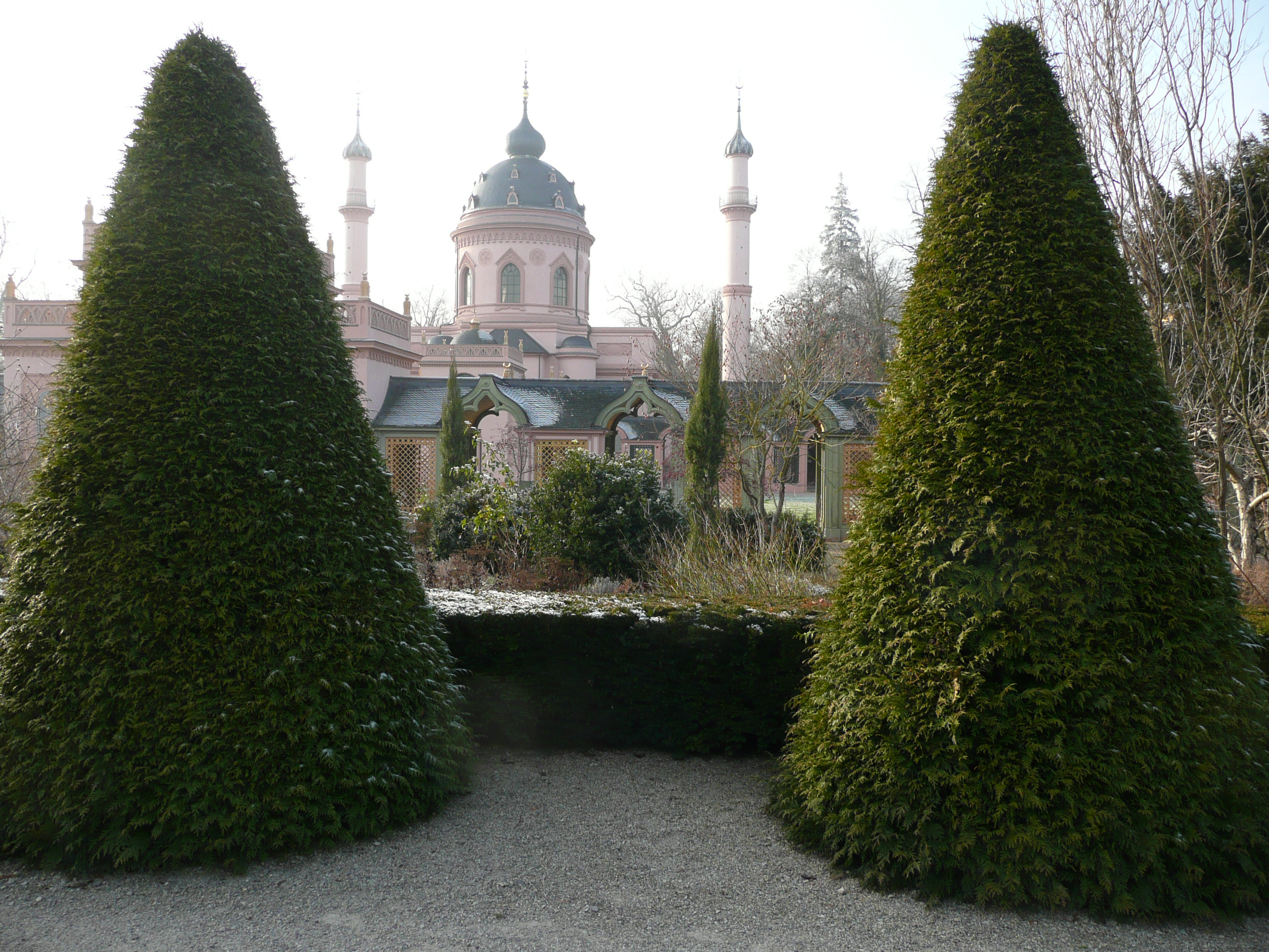 Schlossgarten Schwetzingen, türkischer Garten